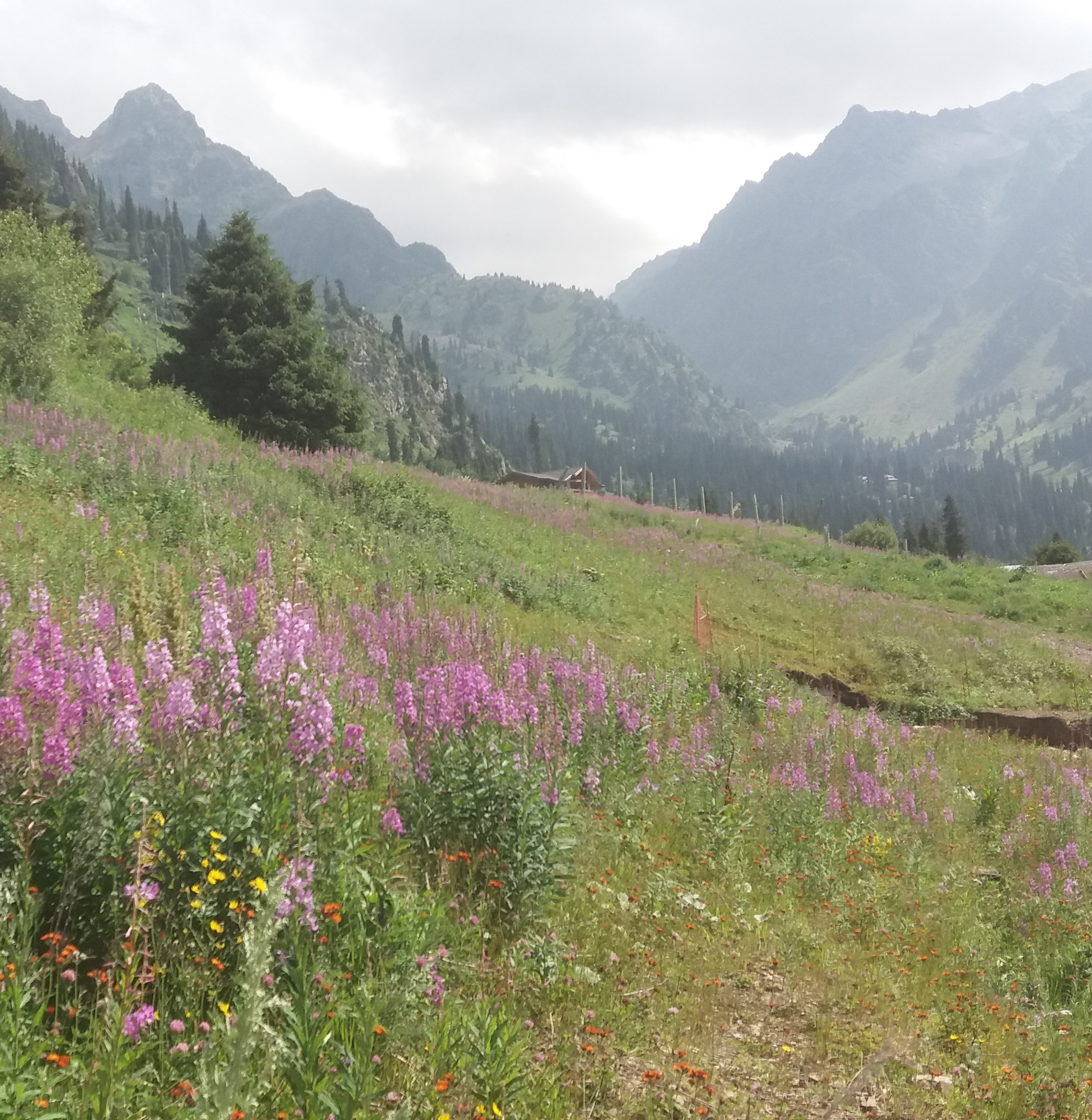 Қазақша (кирил): Жазғы Шымбұлақ